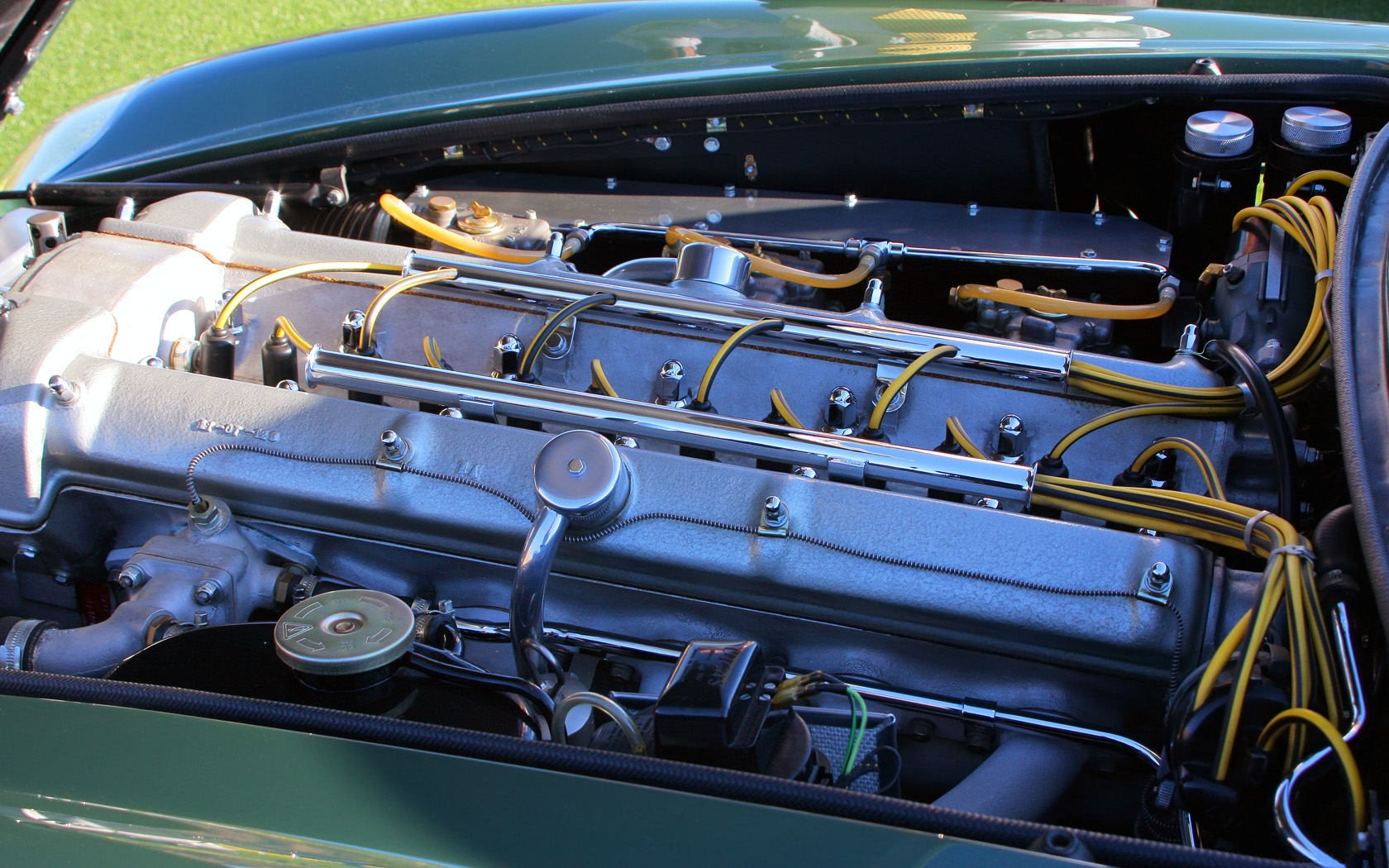 2011 Desert Classic, La Quinta, CA